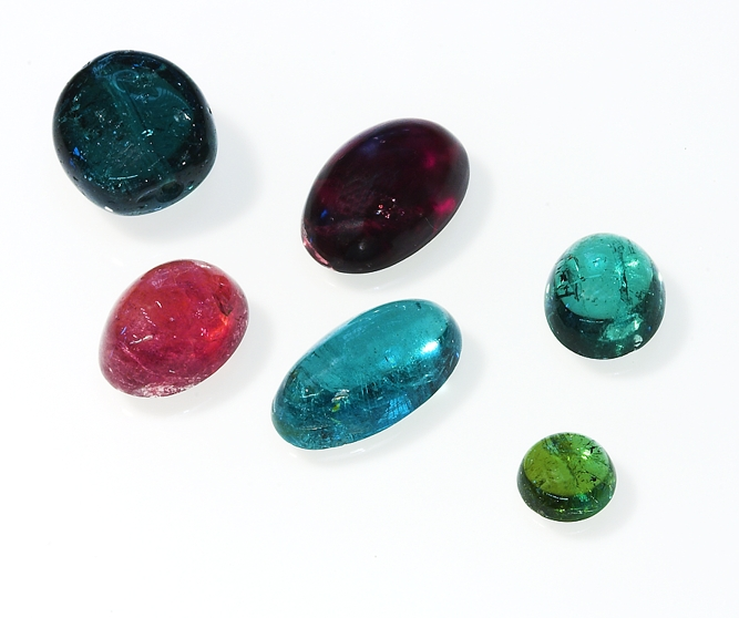 Turmalin in verschiedenen Farben als Cabochon geschliffen